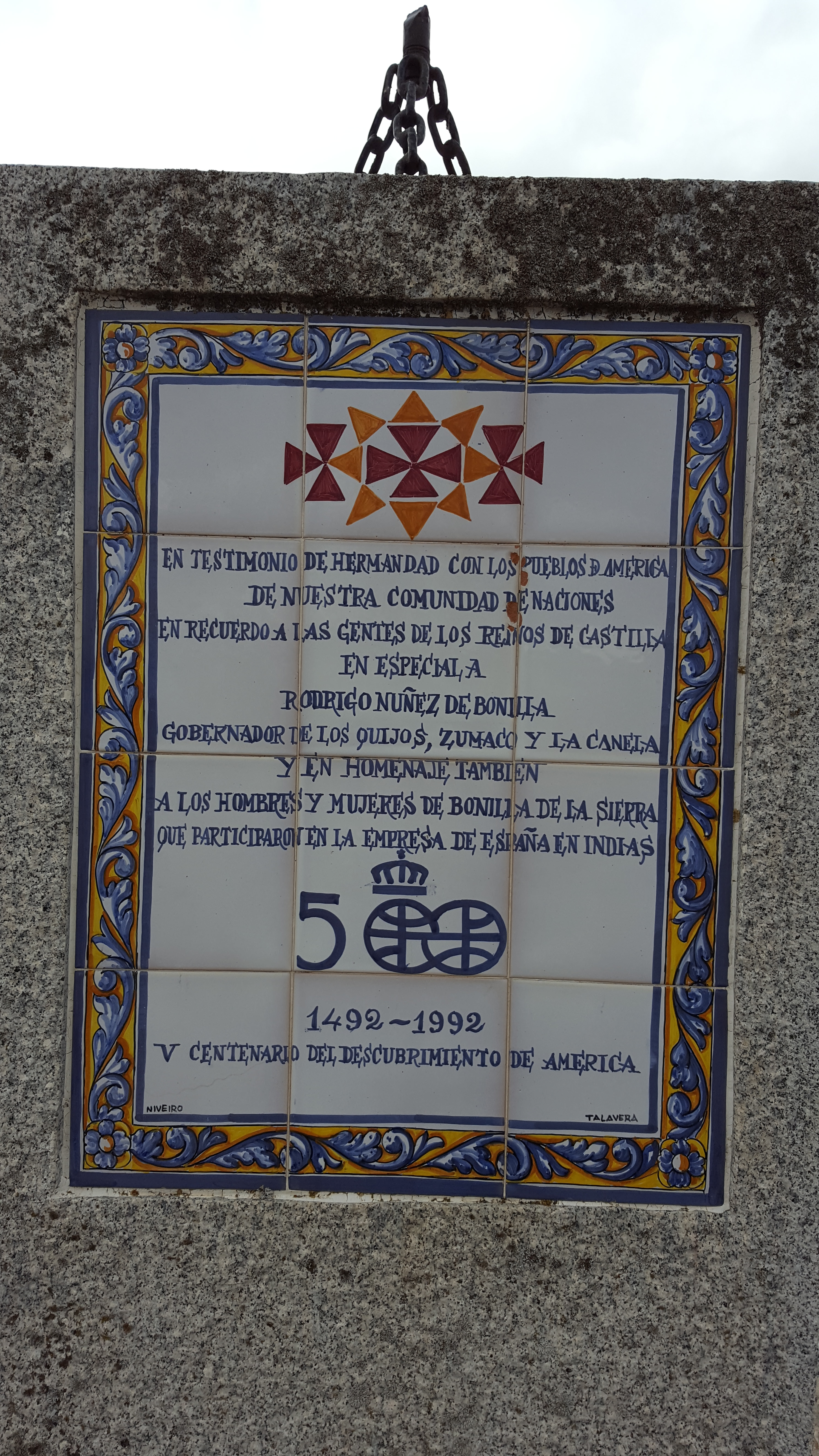 Placa conmemorativa Bonilla de la Sierra, Ávila, España